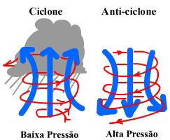 Ciclone e Anti-ciclone